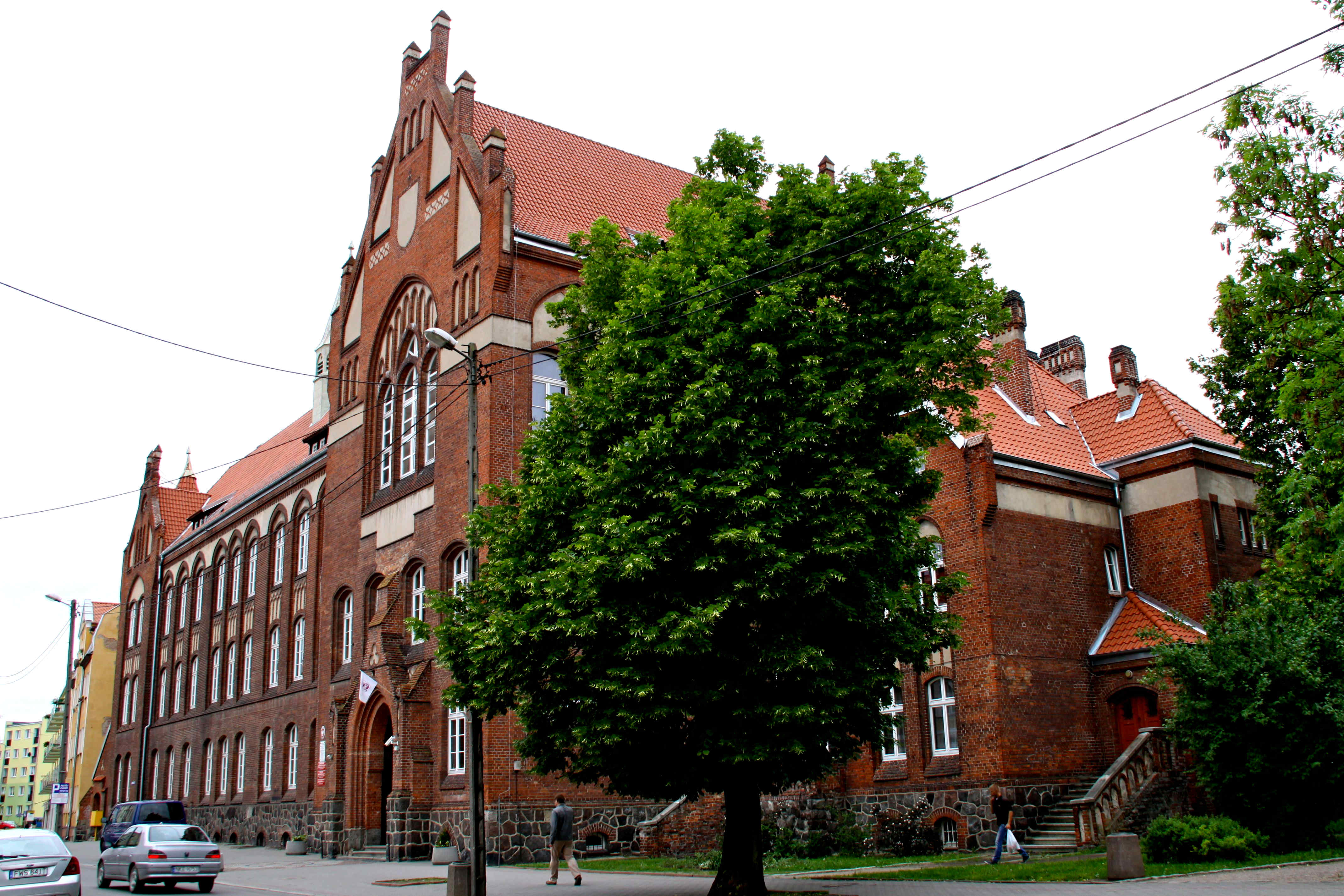 Herzog-Albrechts-Schule Rastenburg